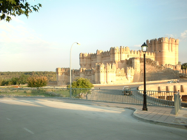 Castillo de Coca Jesus Matesanz Aceves GFDL